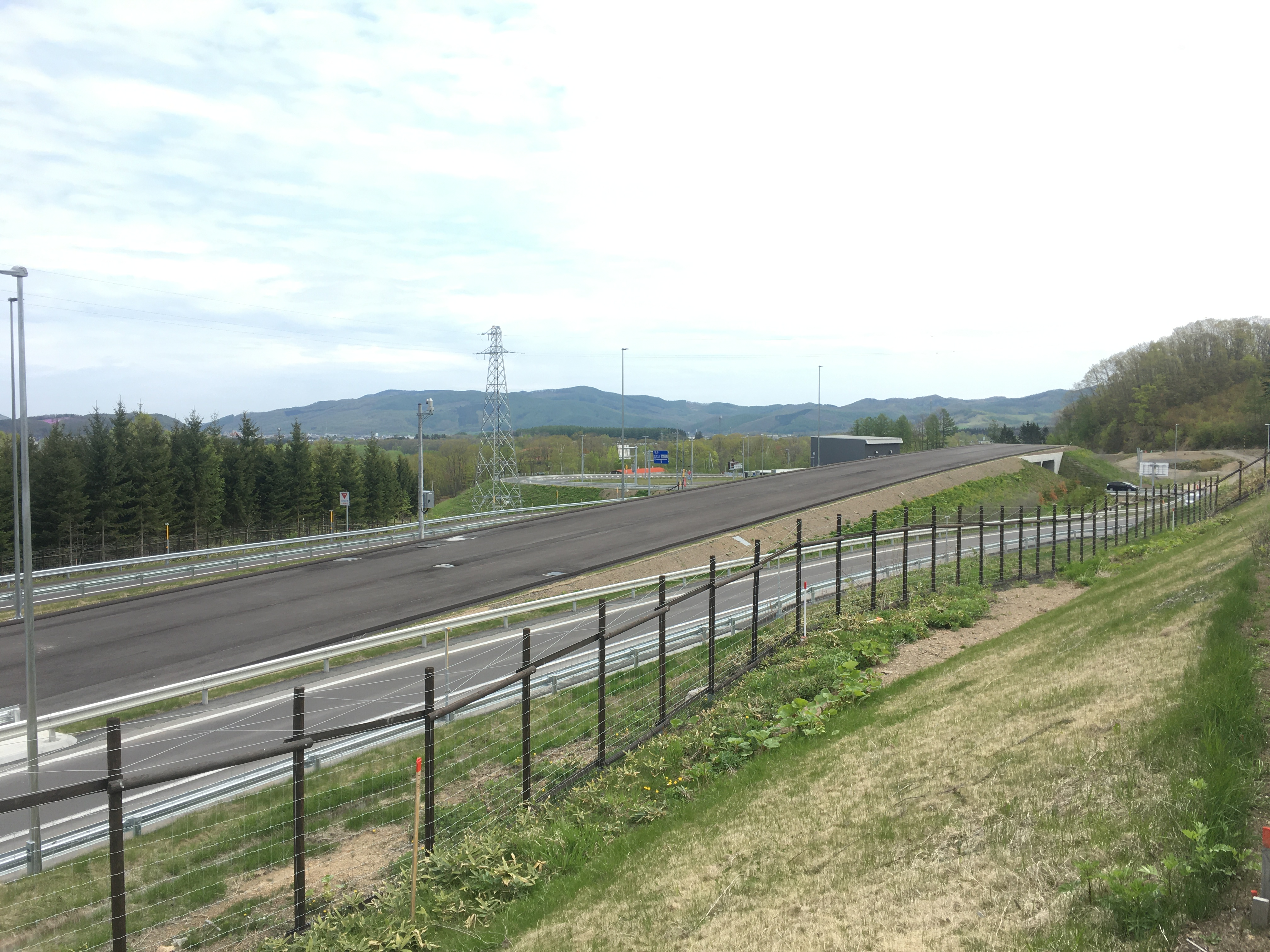 旭川紋別自動車道ja:遠軽インターチェンジ旭川方面オンランプ（紋別郡遠軽町）